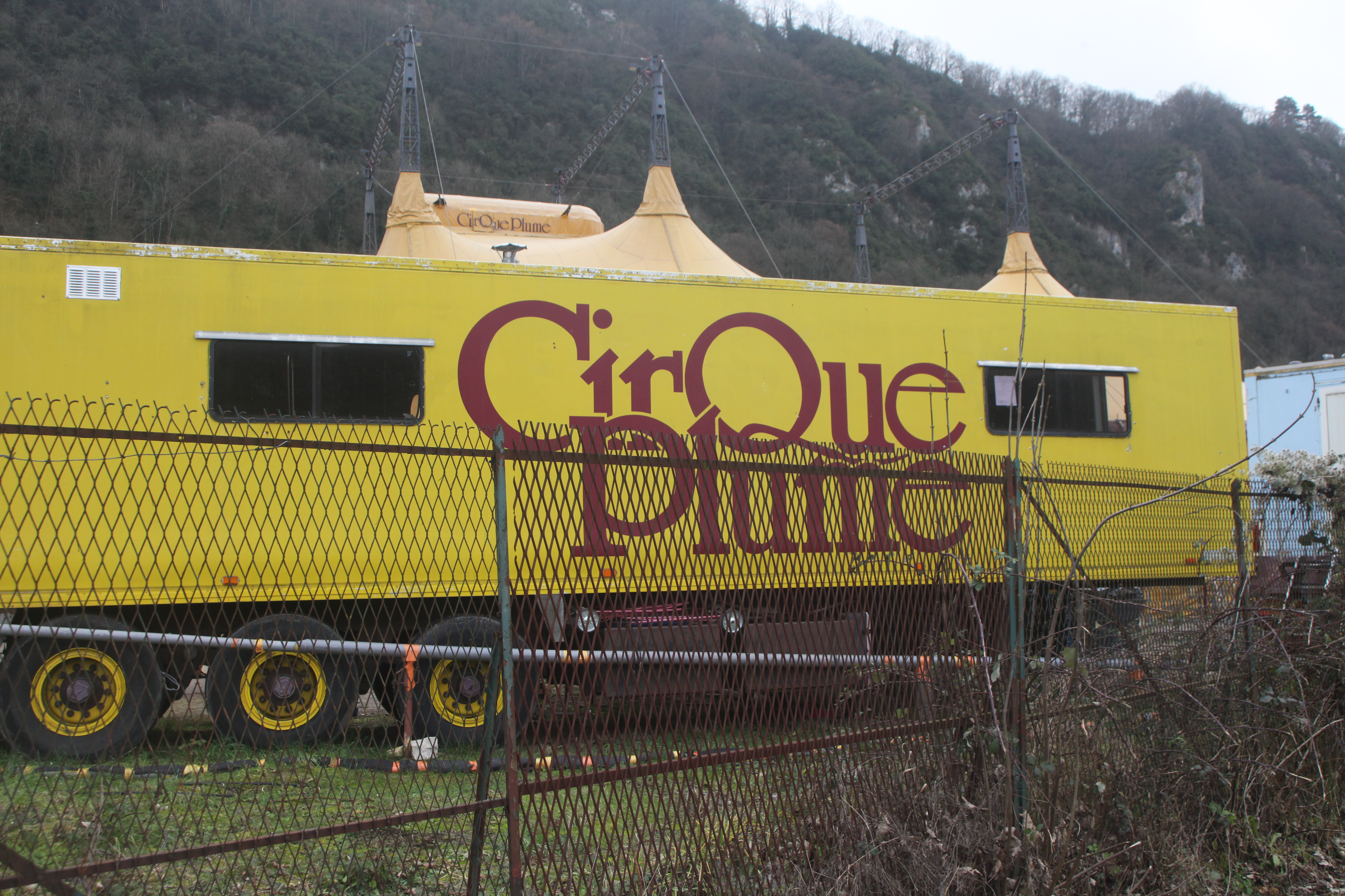 Le cirque Plume à Besançon.